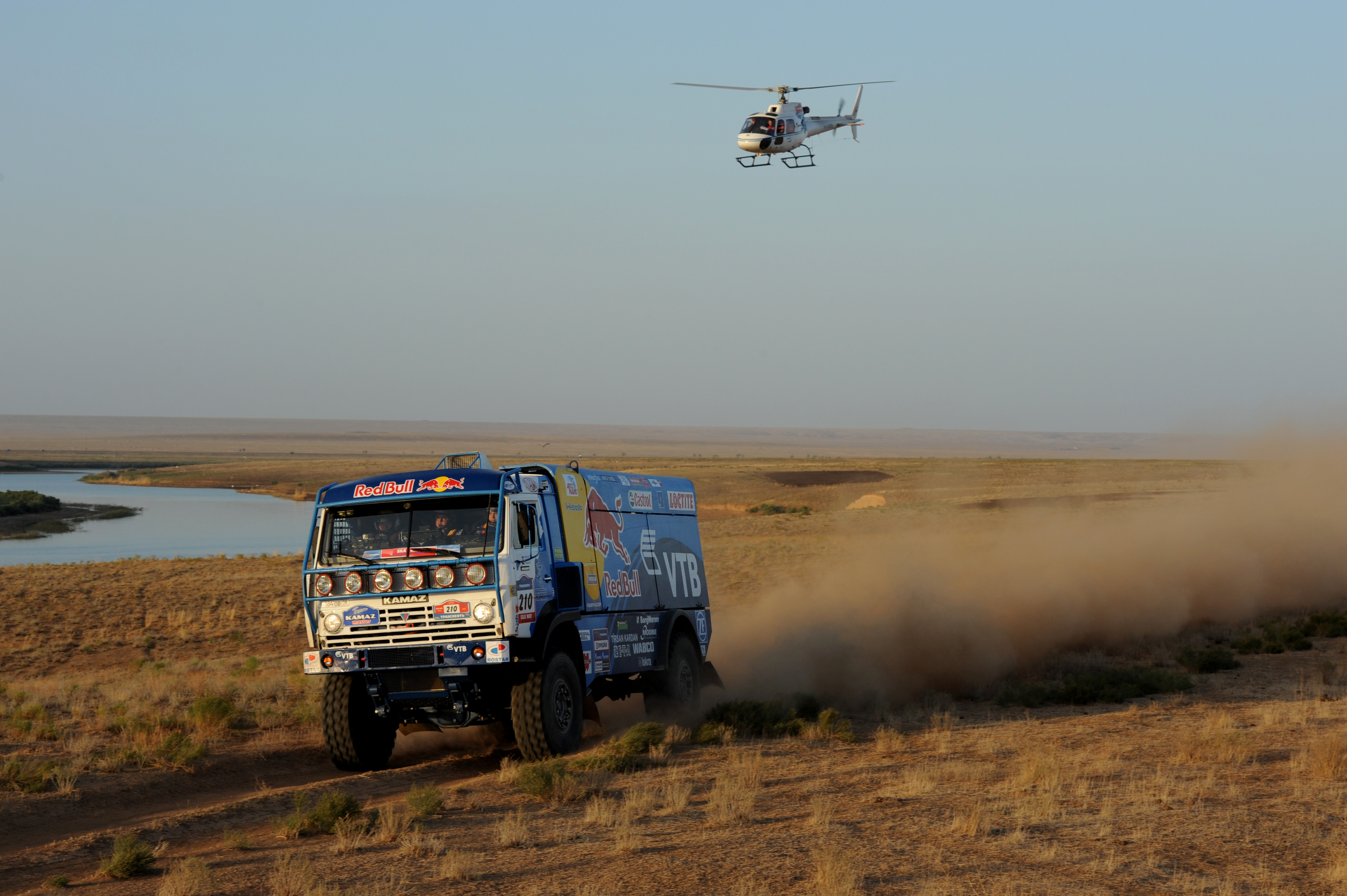 Волгоградская область станет одним из регионов России, через который пройдет главная гонка лета – ралли «Шелковый путь».